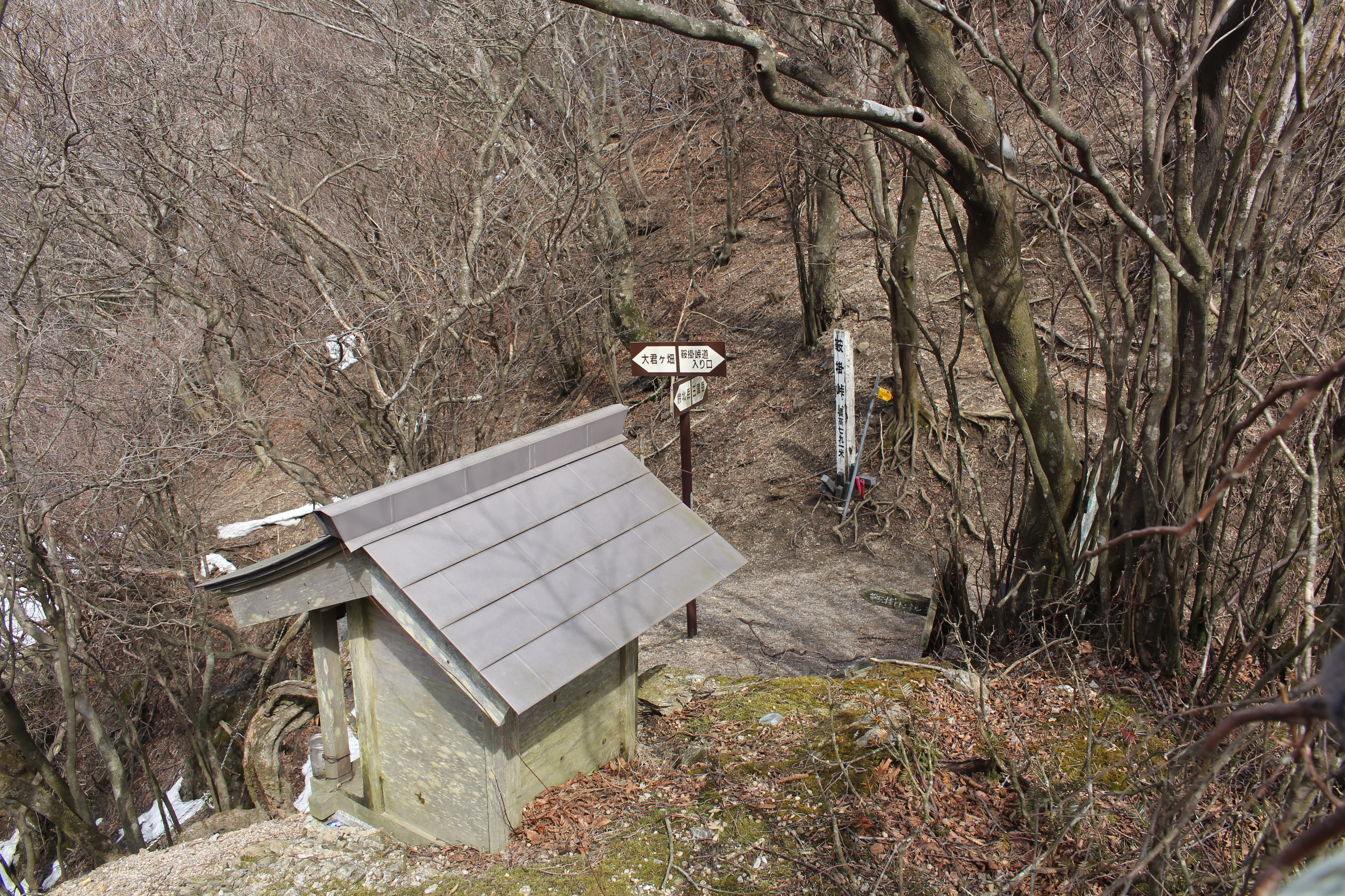 鈴鹿山脈の鞍掛峠、焼尾山と鈴北岳との鞍部、三重県と滋賀県との県境